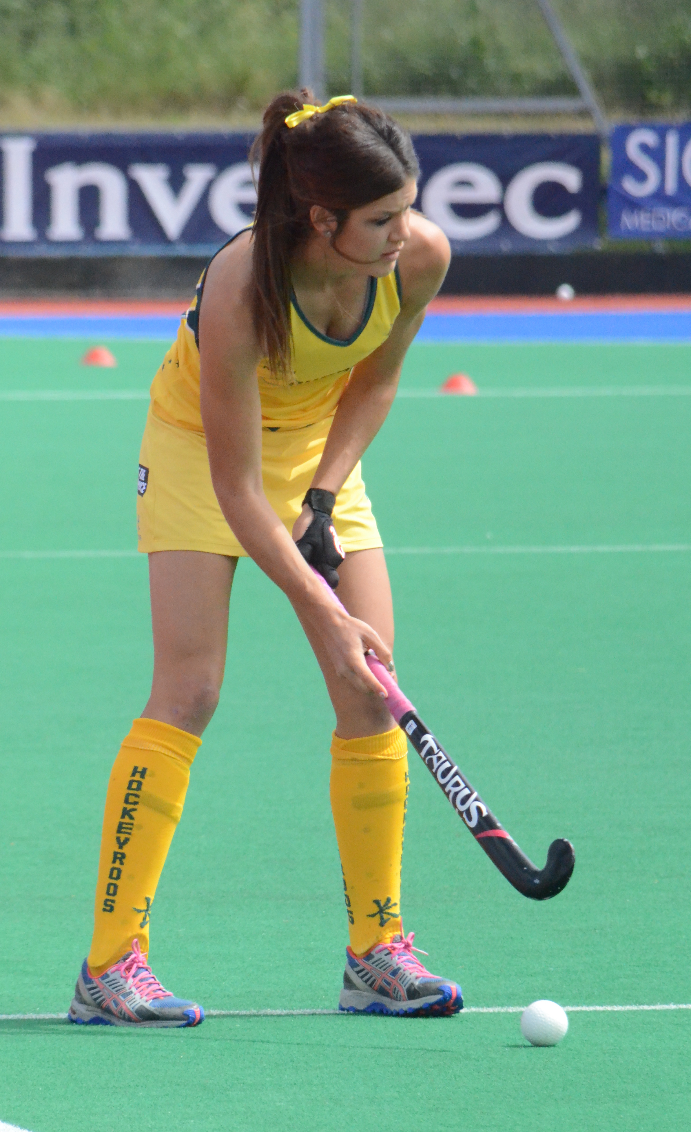 Anna Flanagan